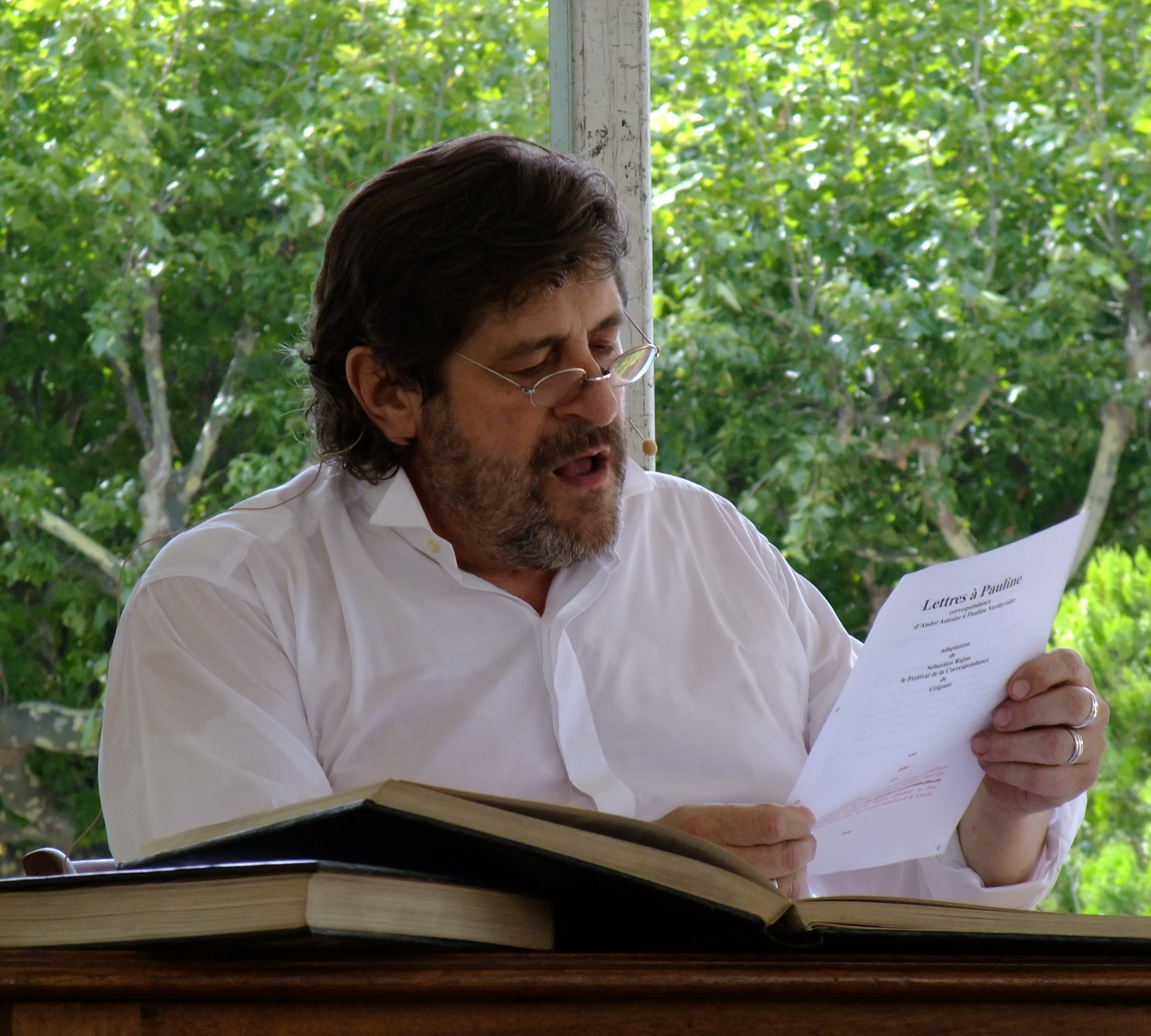 Jacques Frantz au 15° festival de la correspondance de Grignan (Drôme France).